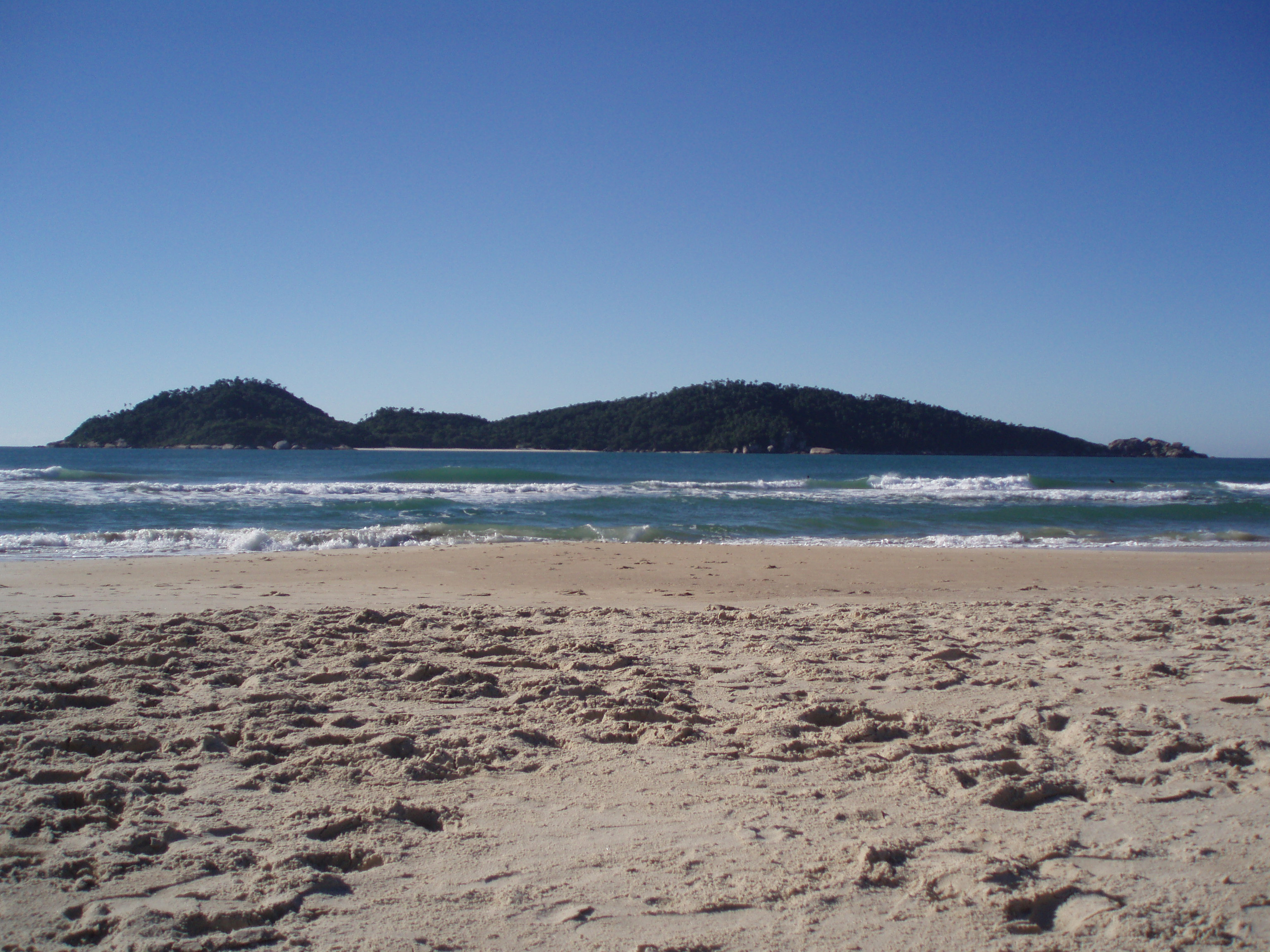 Vue de l'île de Campeche, depuis la plage de Campeche, municipalité de Florianópolis, Brésil